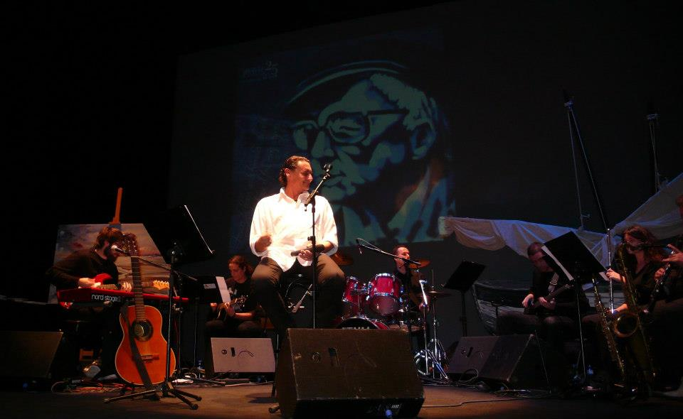 Artur, en concert.